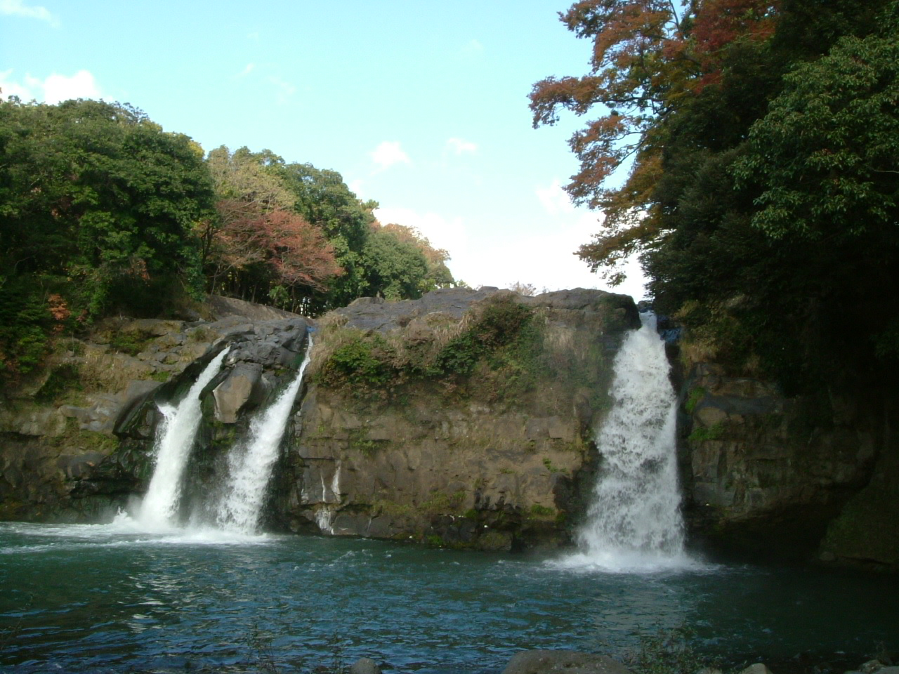 静岡県裾野市五竜の滝（雄滝）